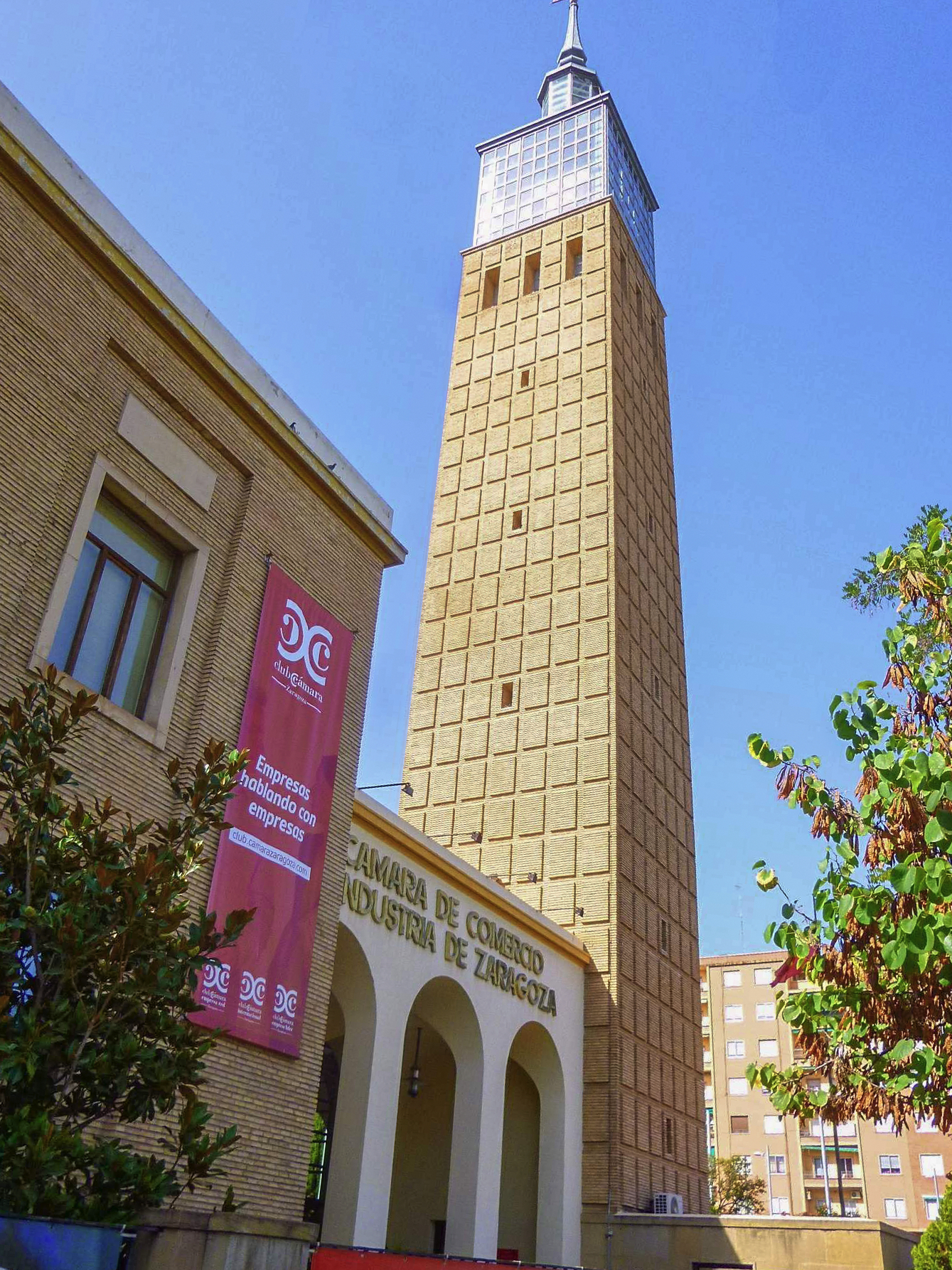 Zaragoza - Cámara de Comercio e Industria